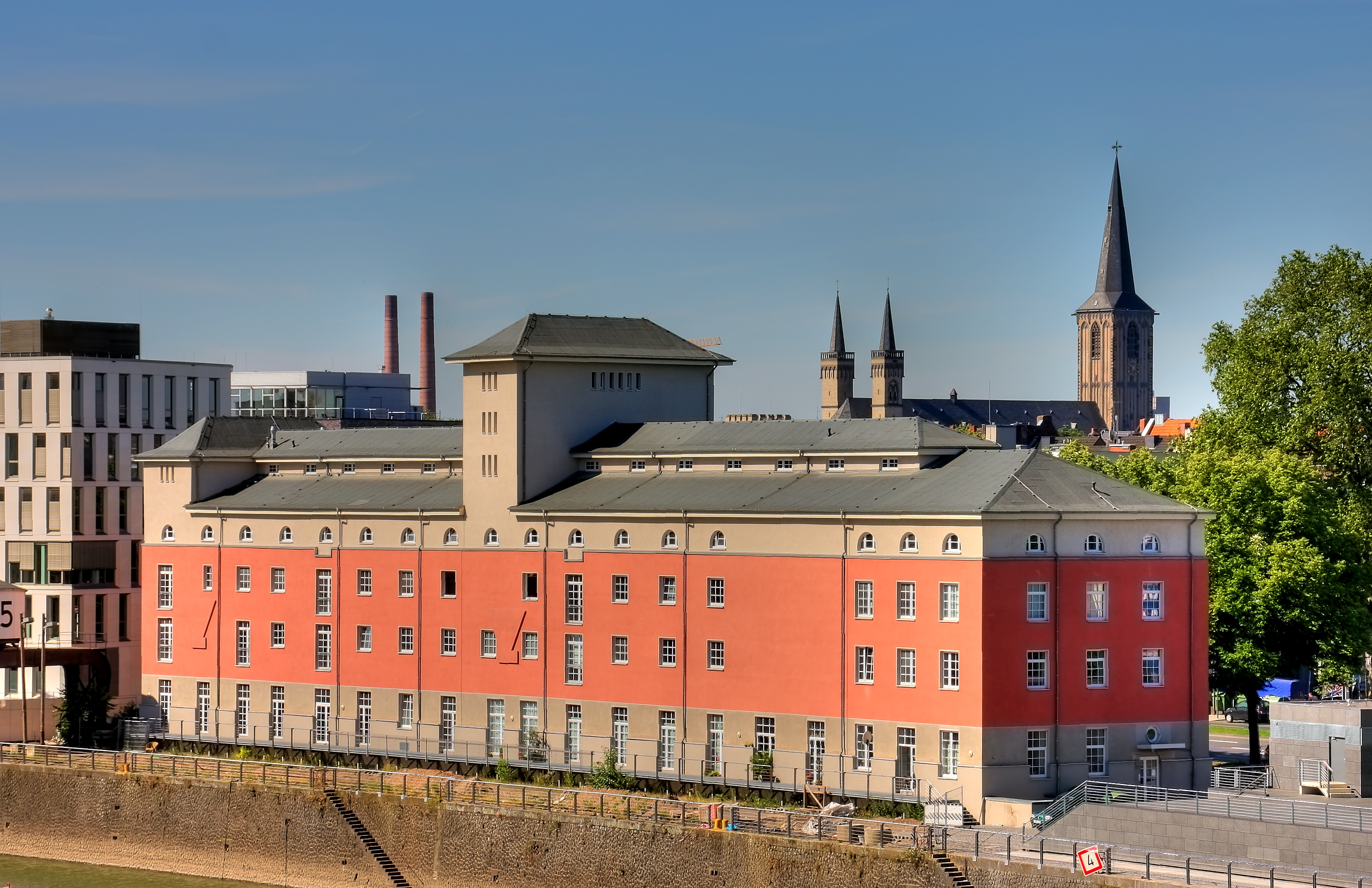 Rheinauhafen Köln. Marinaseite. Kunsthaus Rhenania als Stammsitz des „Künstlermuseum Beckers Böll“. Architekt: unbekannt, Baujahr: um 1920